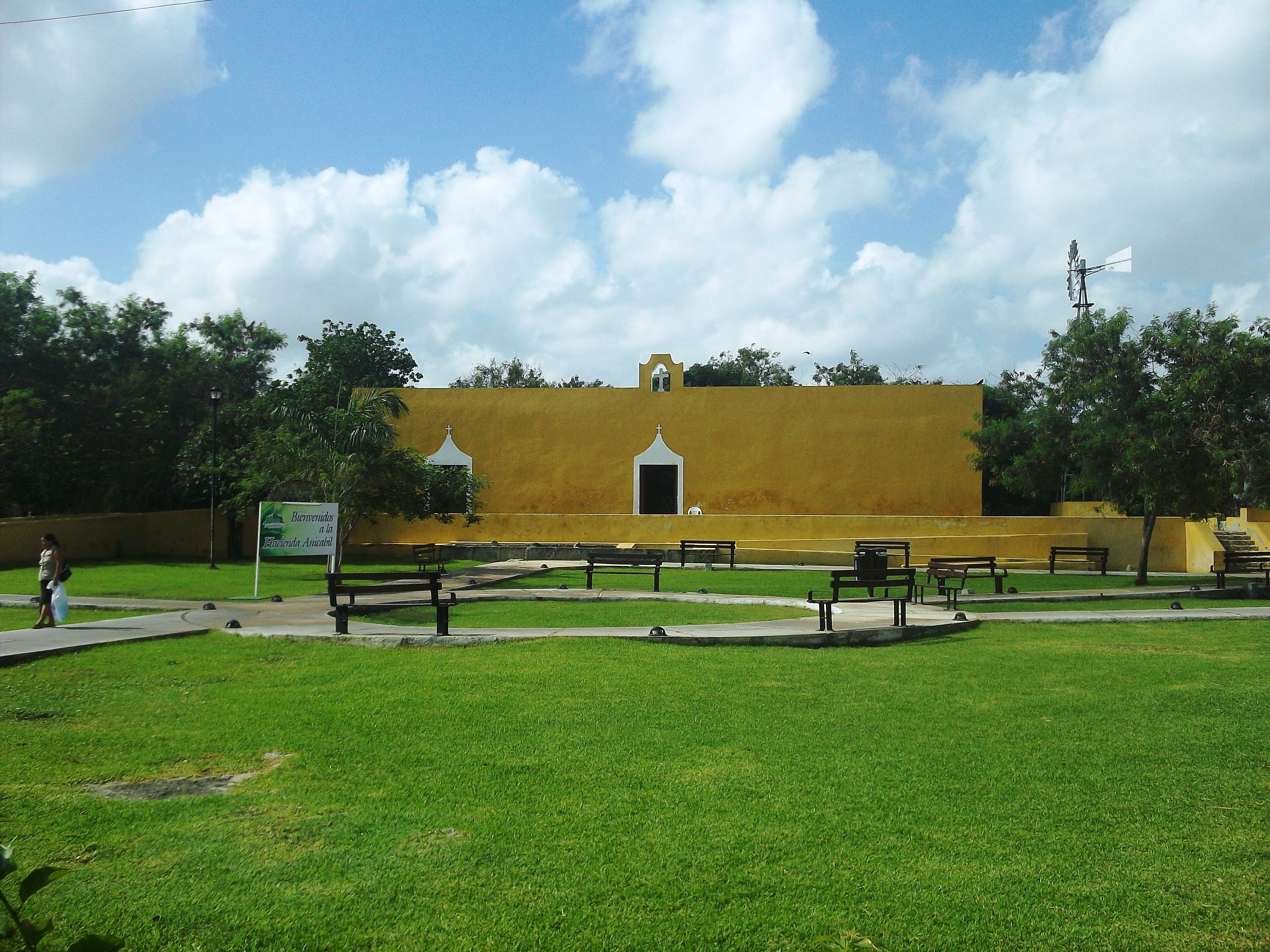 Hacienda Anikabil, Yucatán.